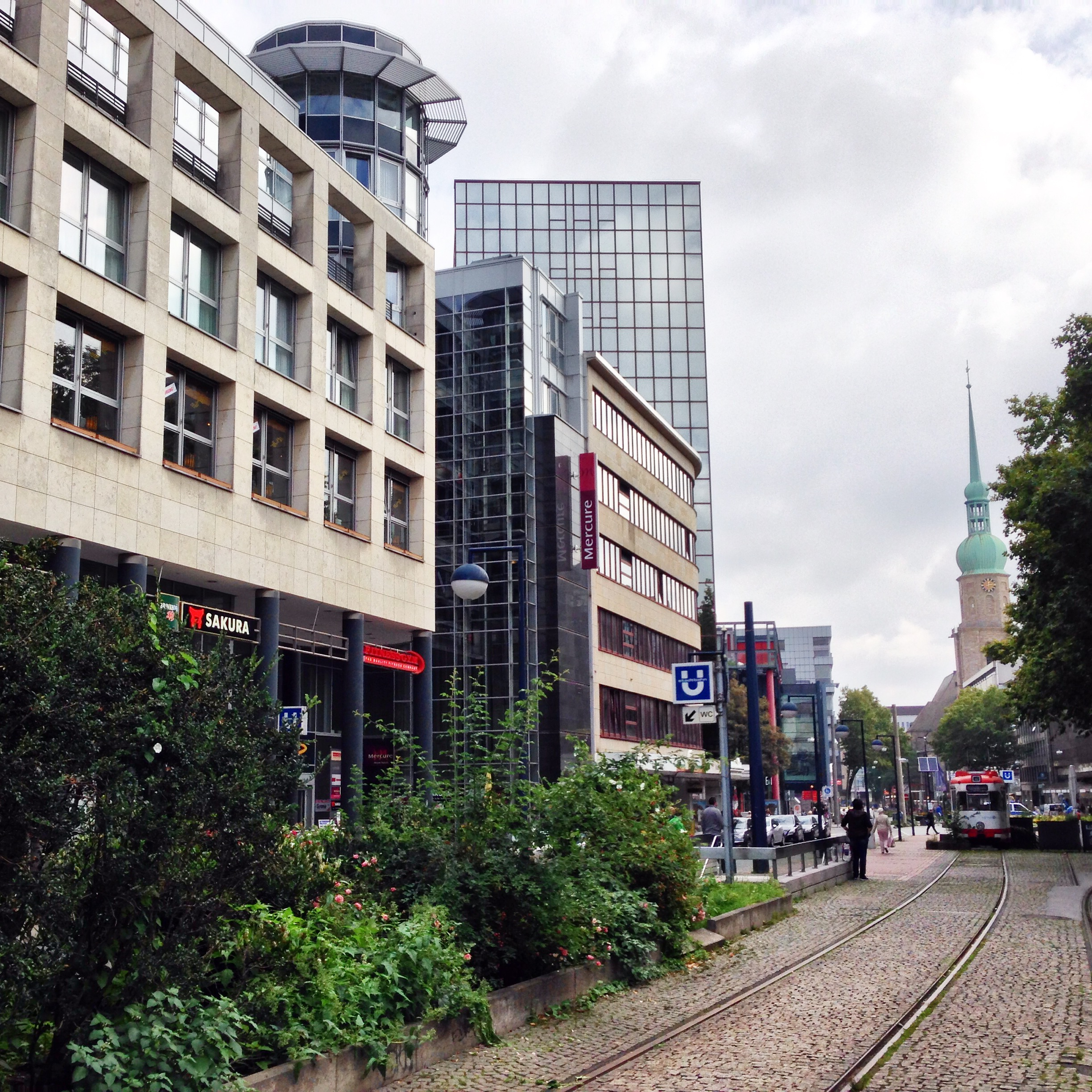 Boulevard Kampstraße als Beispiel der autogerechten Stadtplanung